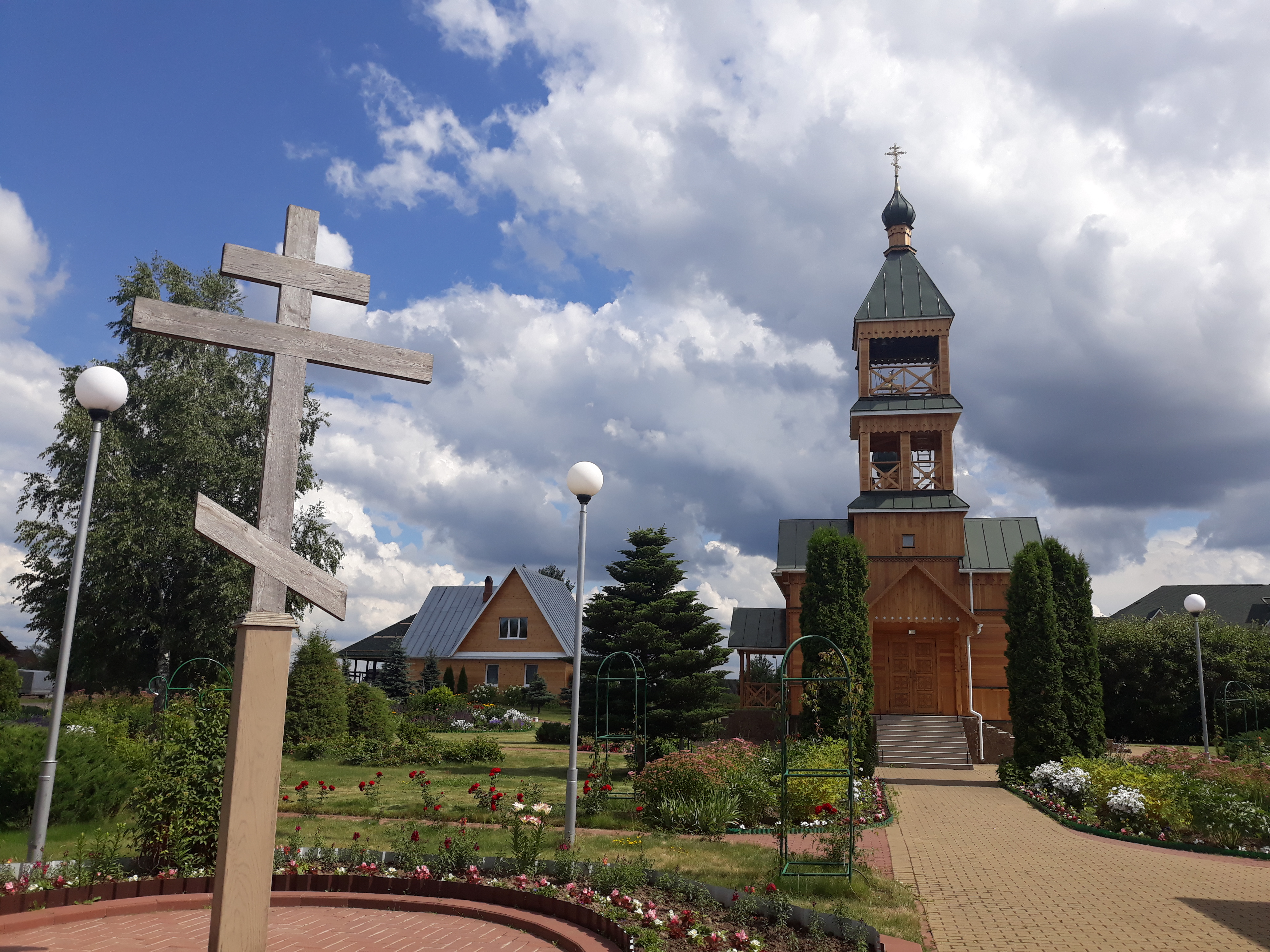 Каралёў Стан, Храм Узвышэння Святога Крыжа